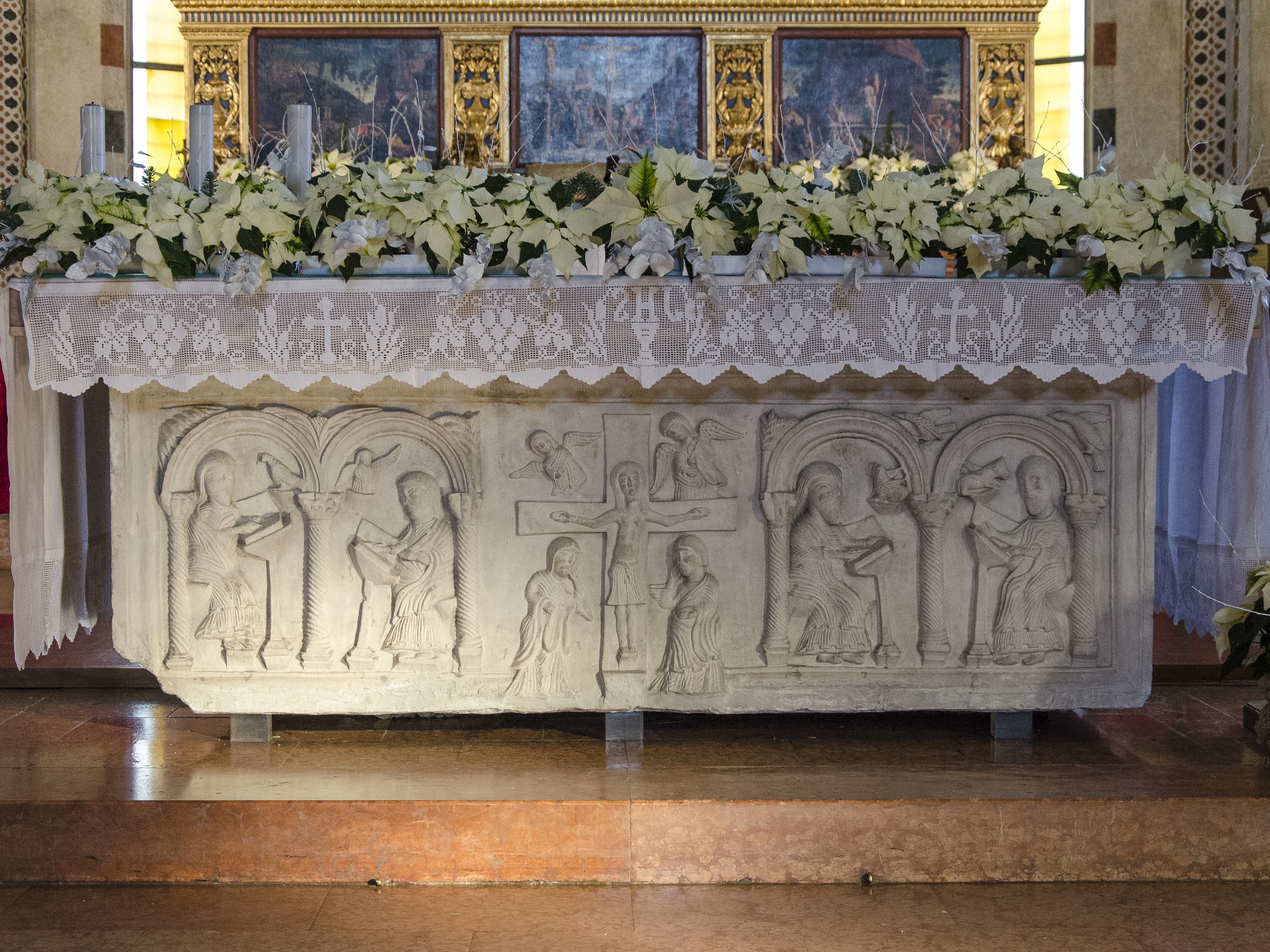 Foto degli interni della chiesa